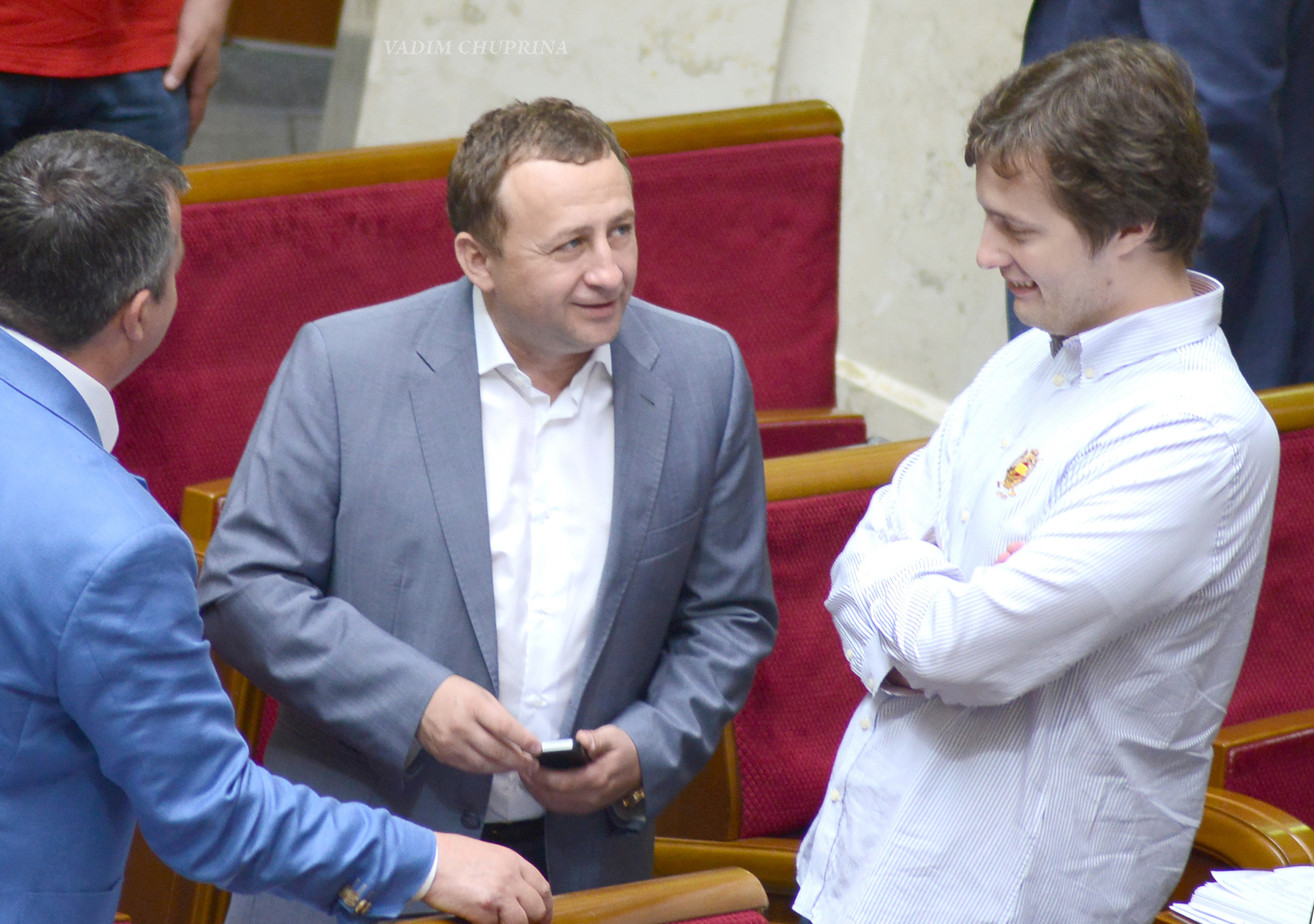 ВЕРХОВНАЯ РАДА УКРАИНЫ 2015 , фото Вадим Чуприна